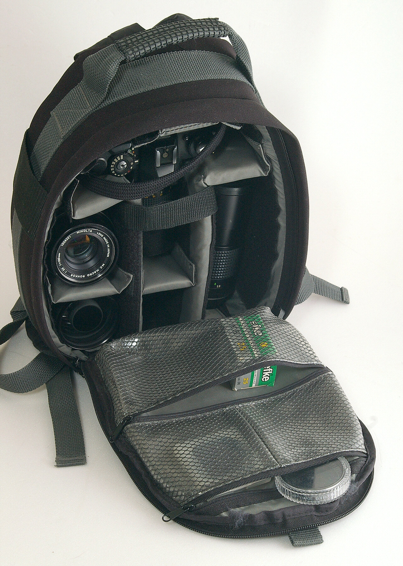 Typischer kleiner Fotorucksack, aufgeklappt. Reißverschlüsse der Kleinteilefächer geöffnet